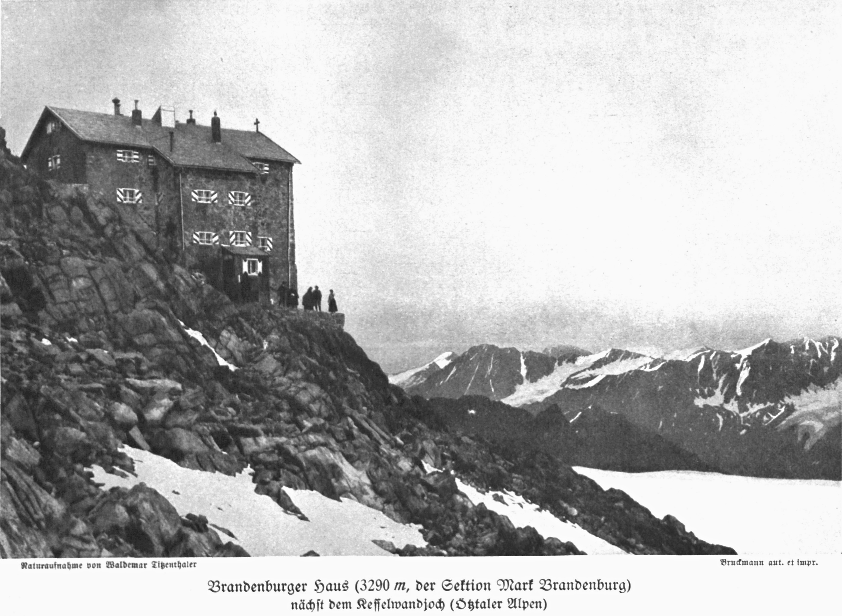 Brandenburger Haus (3290 m, der Sektion Mark Brandenburg) nächst dem Kesselwandjoch (Ötztaler Alpen) (Orirginalbeschreibung)